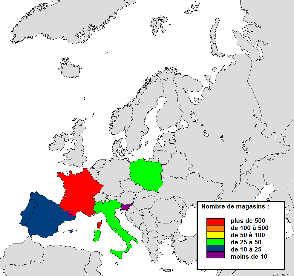 (Modifié depuis Fichier:Location-Europe-UNsubregions, Kosovo as part of Serbia.png) Carte de la répartition des magasins E. Leclerc en Europe.